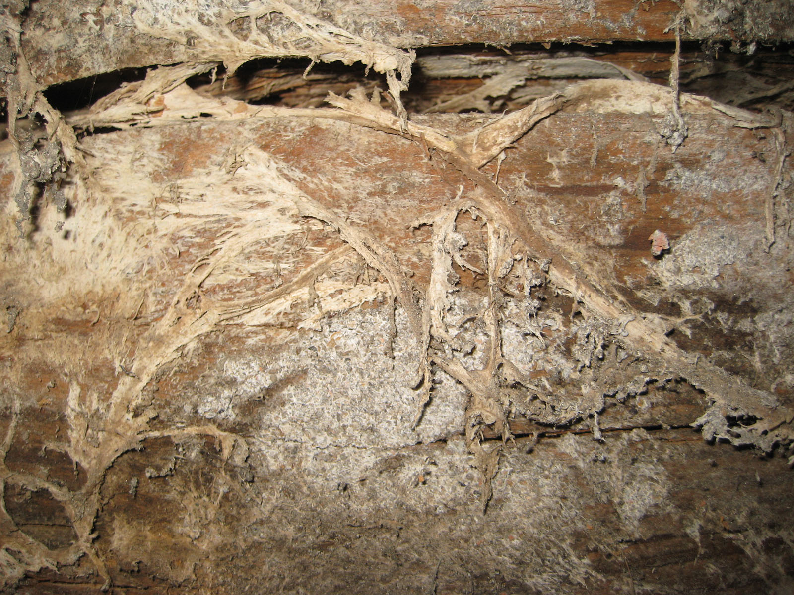 Holzbalken mit intensivem Befall durch Echten Hausschwamm (Serpula lacrymans). Bildbreite entspricht ca. 15 cm.